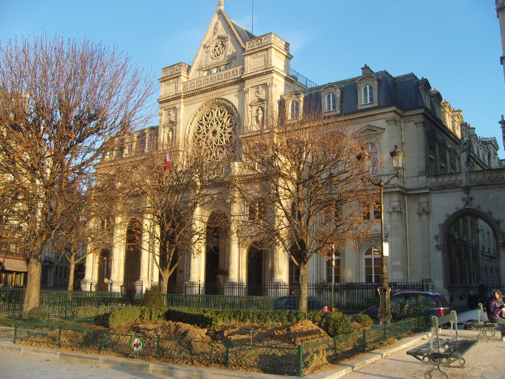 Paris - 1er arrondissement - mairie, façade